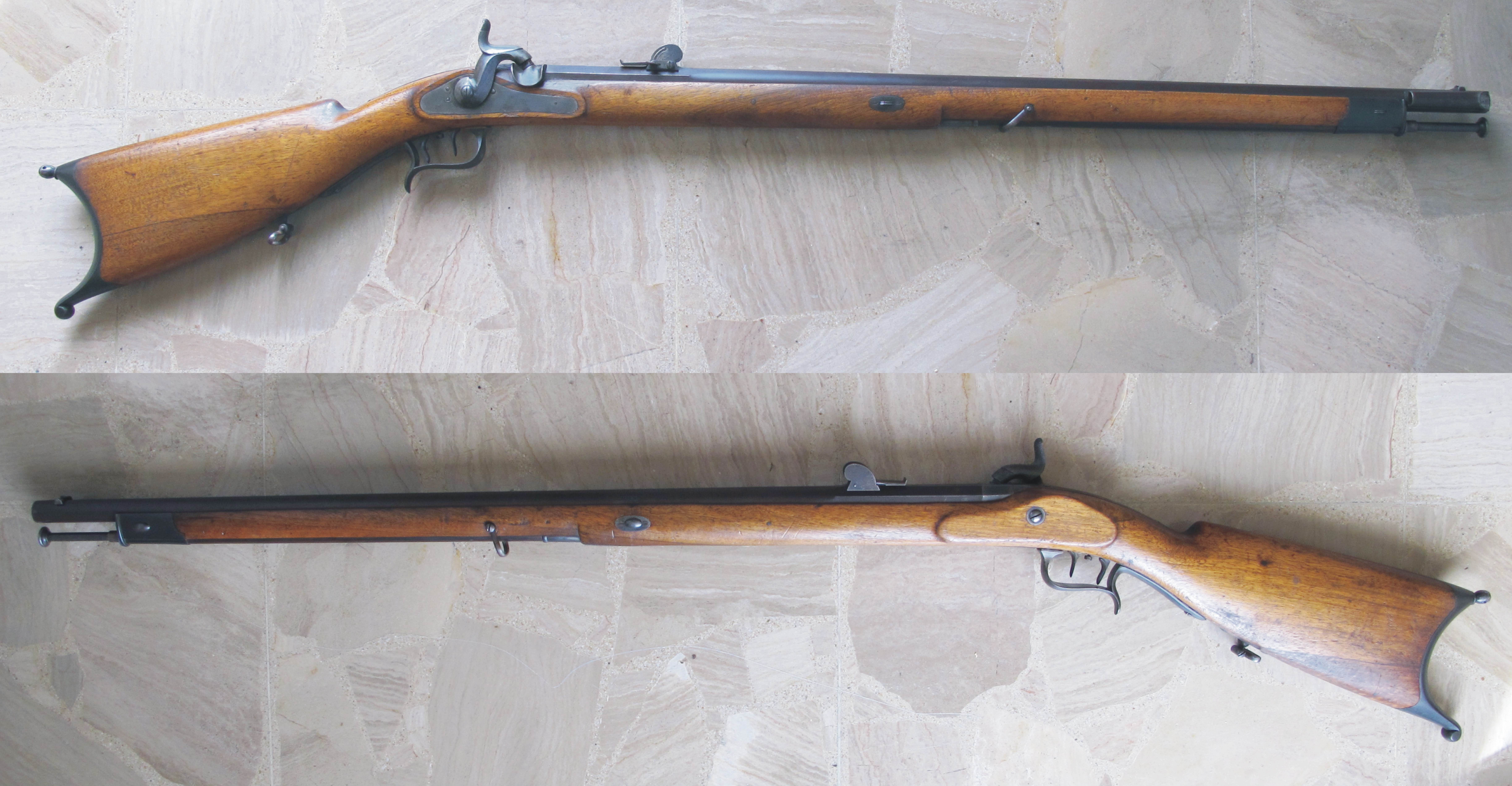 Carabine fédérale modèle de 1851, cal. 10.4mm à percussion